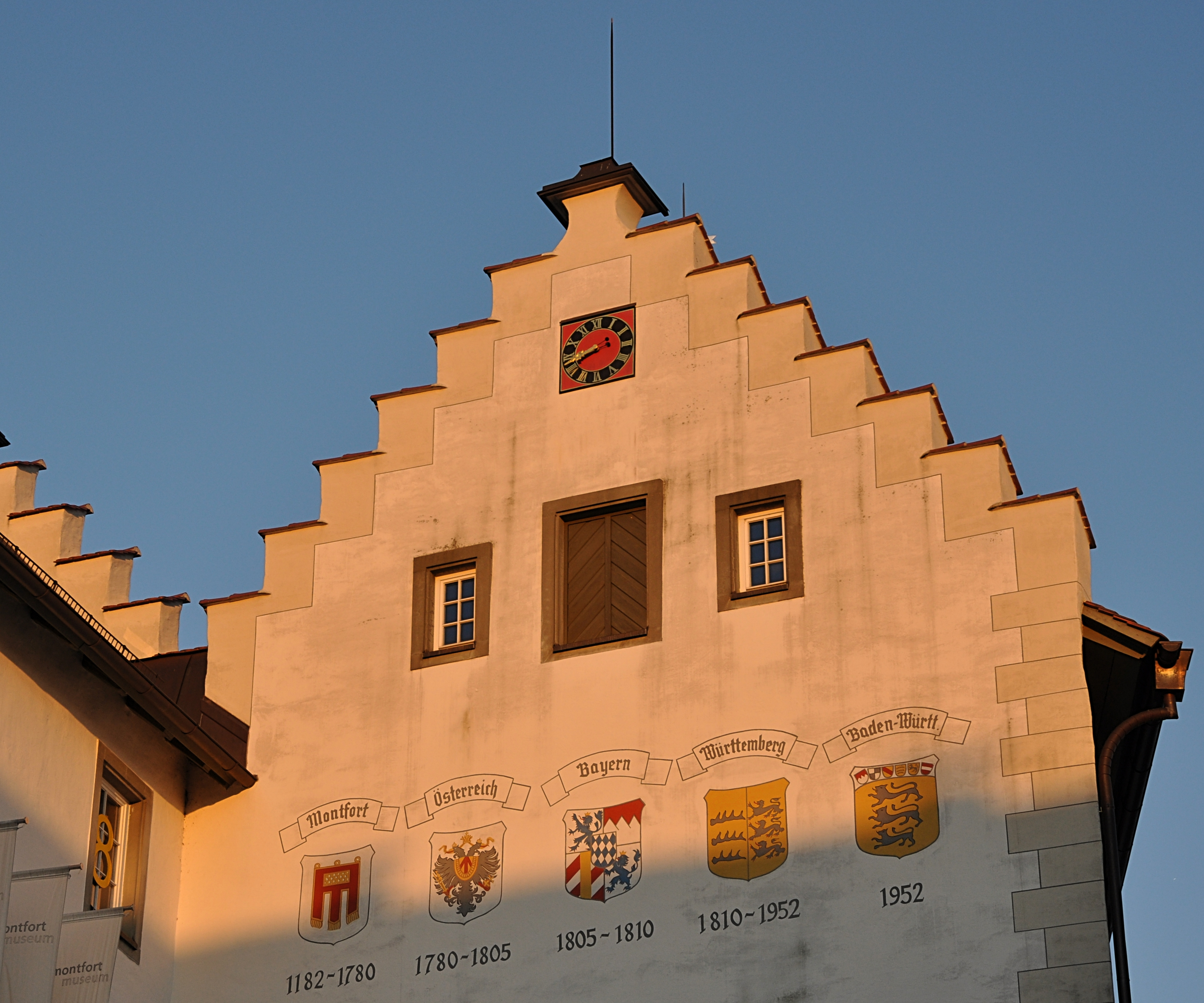 Torschloß Tettnang, Bodenseekreis, baden-Württemberg, Deutschland